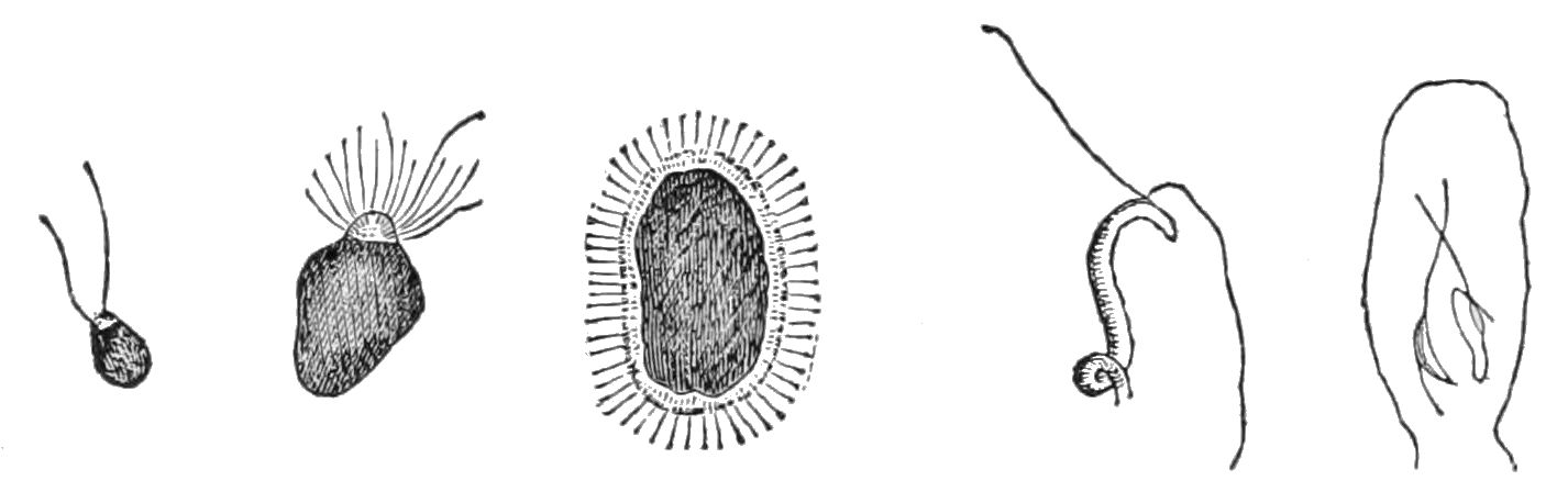 Zoospores